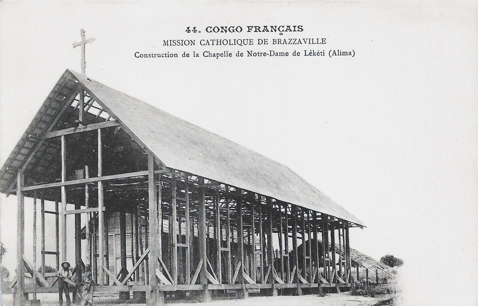 Mission catholique de Brazzaville. Construction de la chapelle de Notre-Dame de Lékéti (Alima). pas de mention d'auteur, d'éditeur ou de date Congo Français